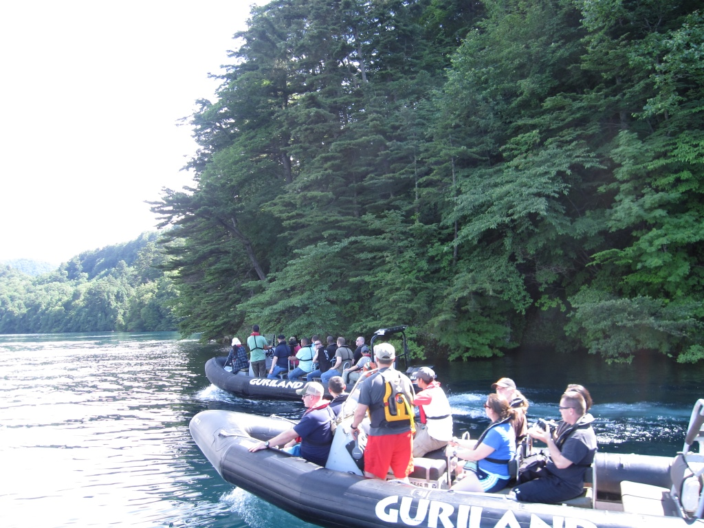 最近は十和田湖にてRIBの機動性を生かした観光ツアーも人気